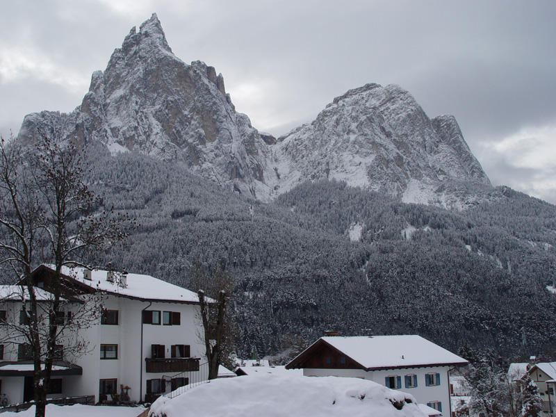 Seis am Schlern mit Santner